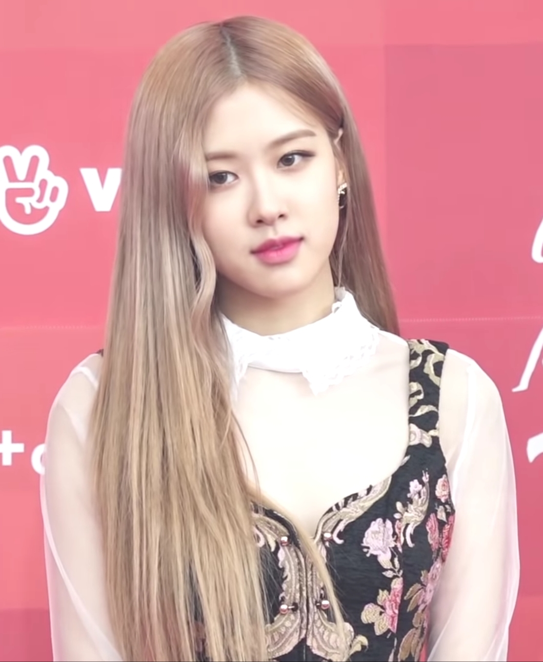 20200207 (INSTAGRAM) 블랙핑크(BLACKPINK ROSÉ), (Instagram @roses_are_rosie)